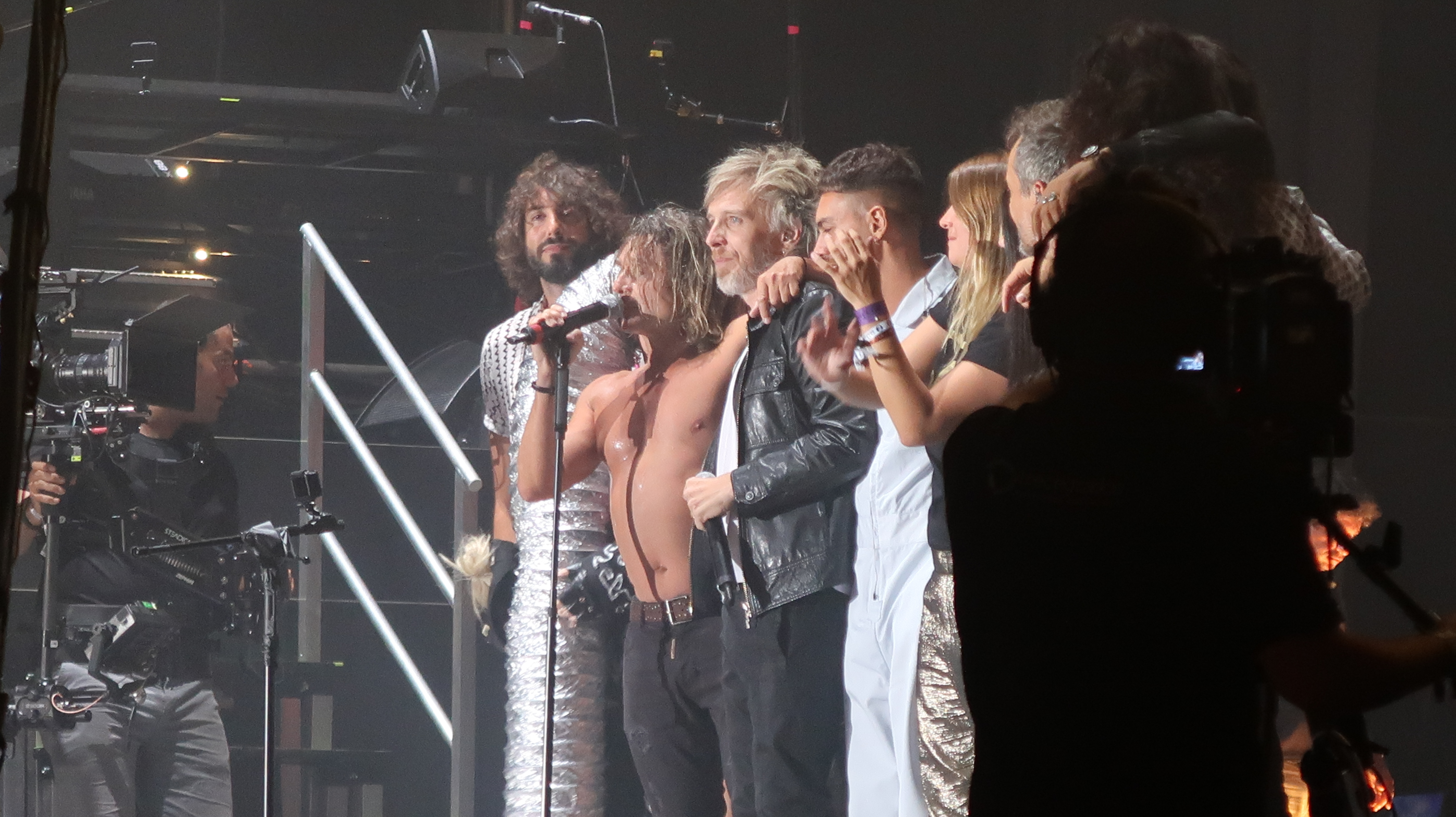 Nacho Cano tras su vuelta a los escenarios tras 22 años, acompañado de Alberto Jiménez de Miss Caffeina, Rafa Sánchez de La Unión, Gabriel de la Rosa de Shinova, Javiera Mena, Maryan de Kuve con Aire, Zahara, Tomatito, Shuarma de Elefantes, Santi Balmes, Mikel Izal, Rulo, Paco Clavel & Rocío de Las Chillers, tras su concierto en el festival Sonorama Ribera 2019 en Aranda de Duero (Burgos), en España